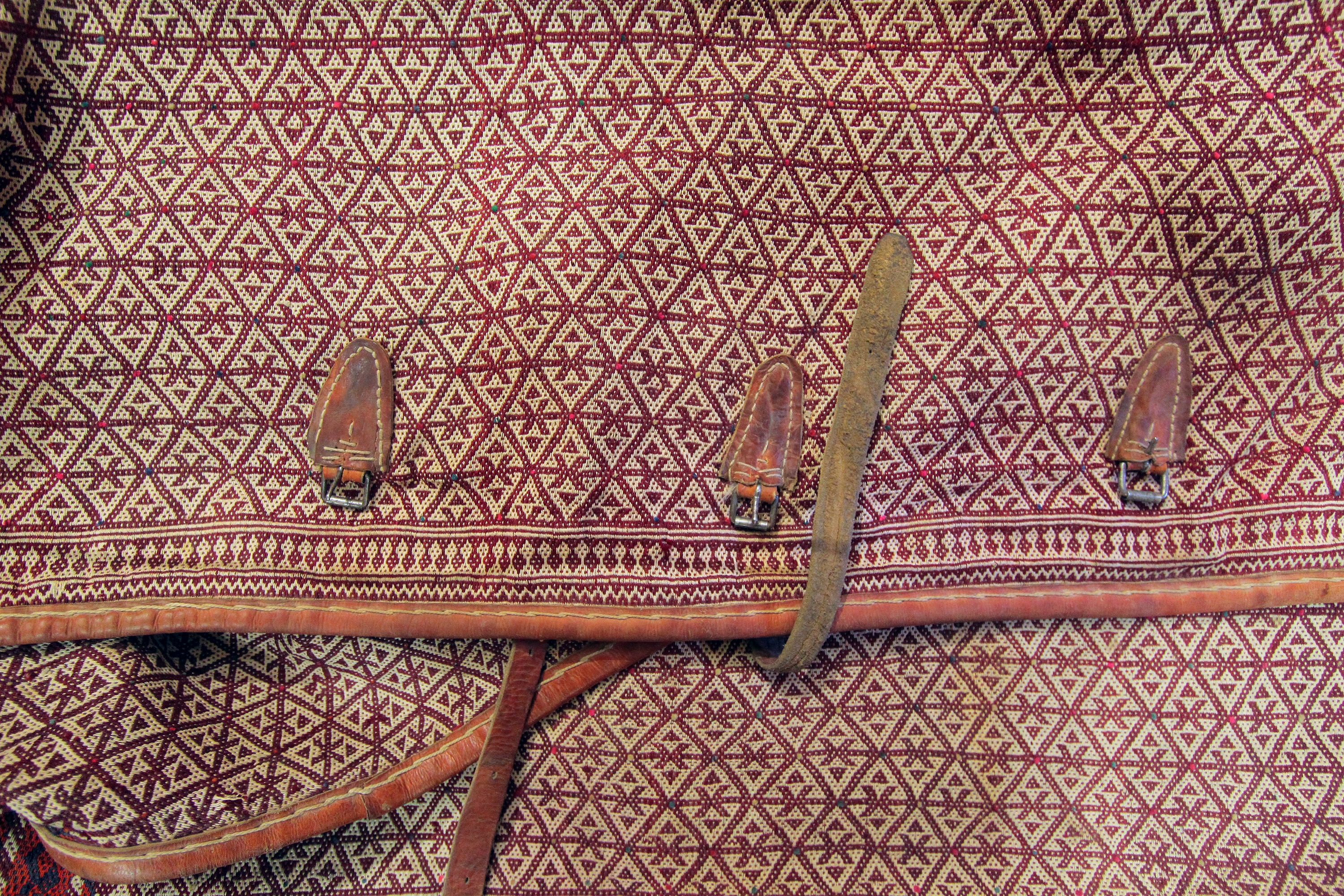 جاجیم گونه‌ای زیرانداز دورویه است. جاجیم دست‌بافی است از پارچهٔ کلفت شبیه به پِلاس که از پلاس نازک‌تر است و آن را از نخ‌های رنگین و ظریف پشمی یا پنبه‌ای یا آمیزه‌ای از این دو می‌بافند. جاجیم‌ها پرز ندازند و می‌توان از هر دو روی آن استفاده کرد.